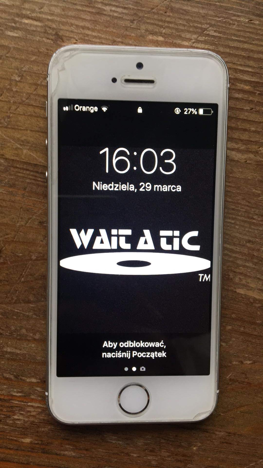 iPhone 5 działający na systemie iOS 12.1.4